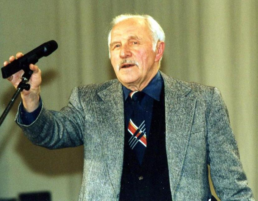 актёр Михаил Ульянов